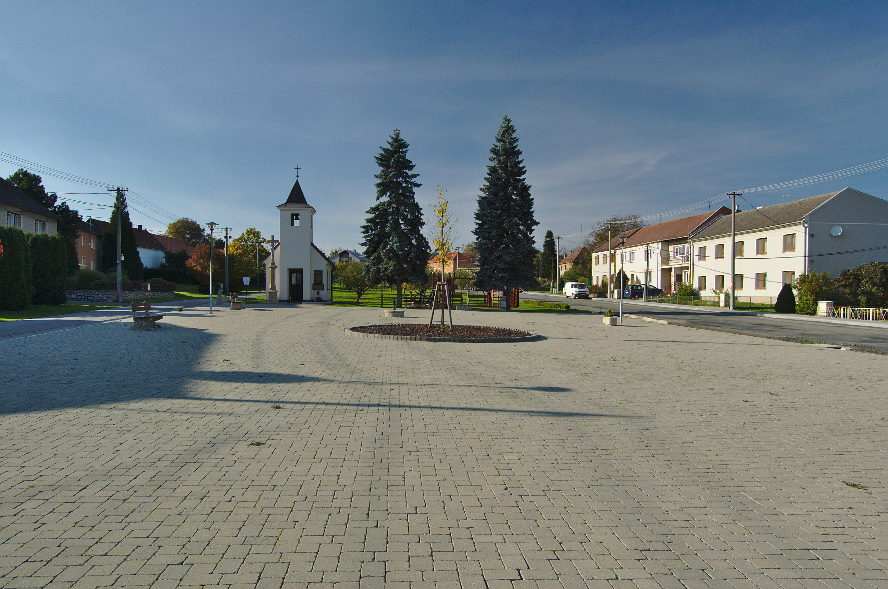 Kaple Nanebevzetí Panny Marie, Rakůvka, okres Prostějov